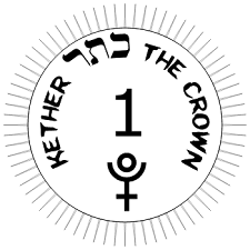 Kether ("Corona") (כֶּתֶר)